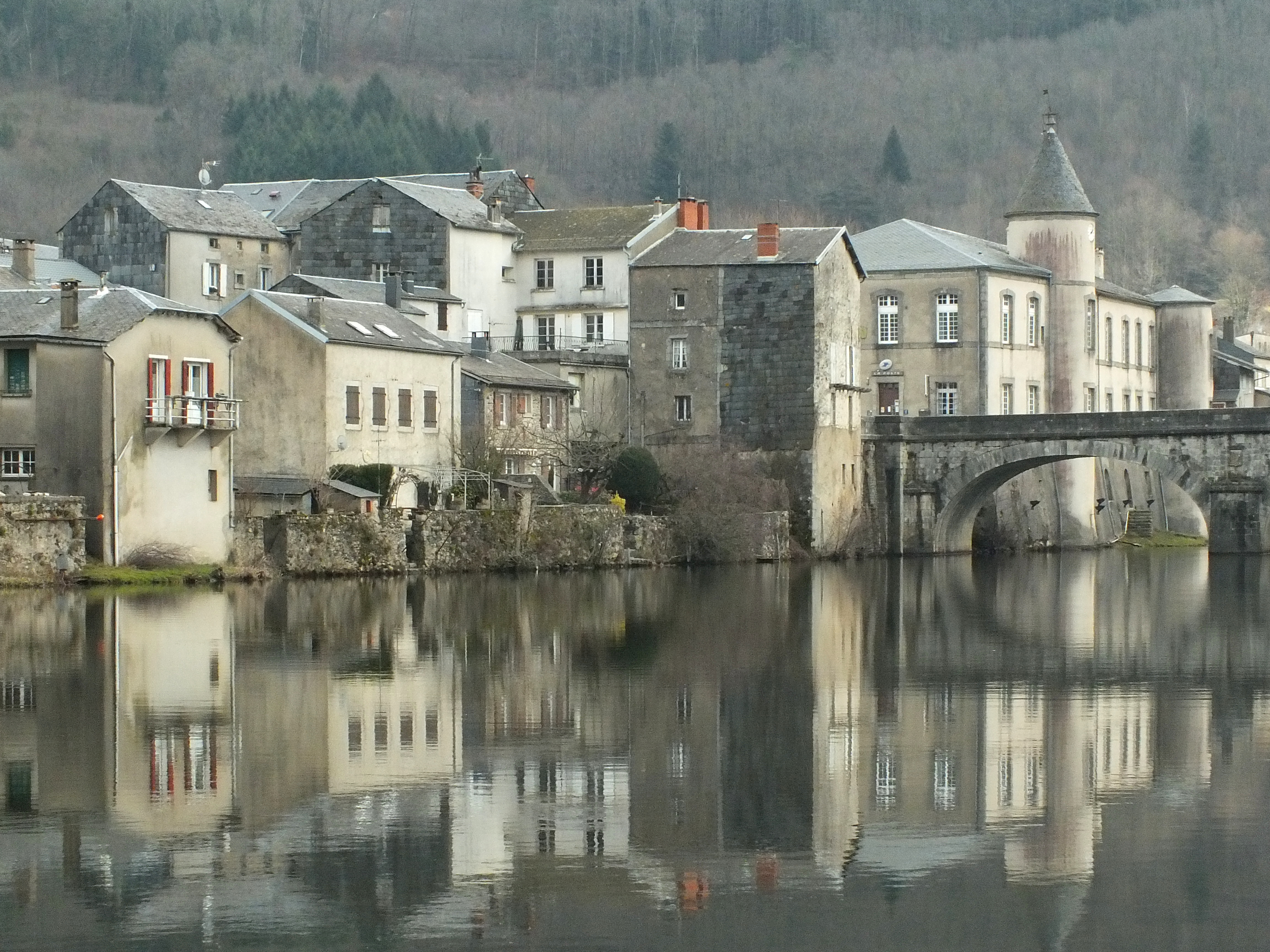 Vue panoramique de Brassac se reflétant dans l'Agout